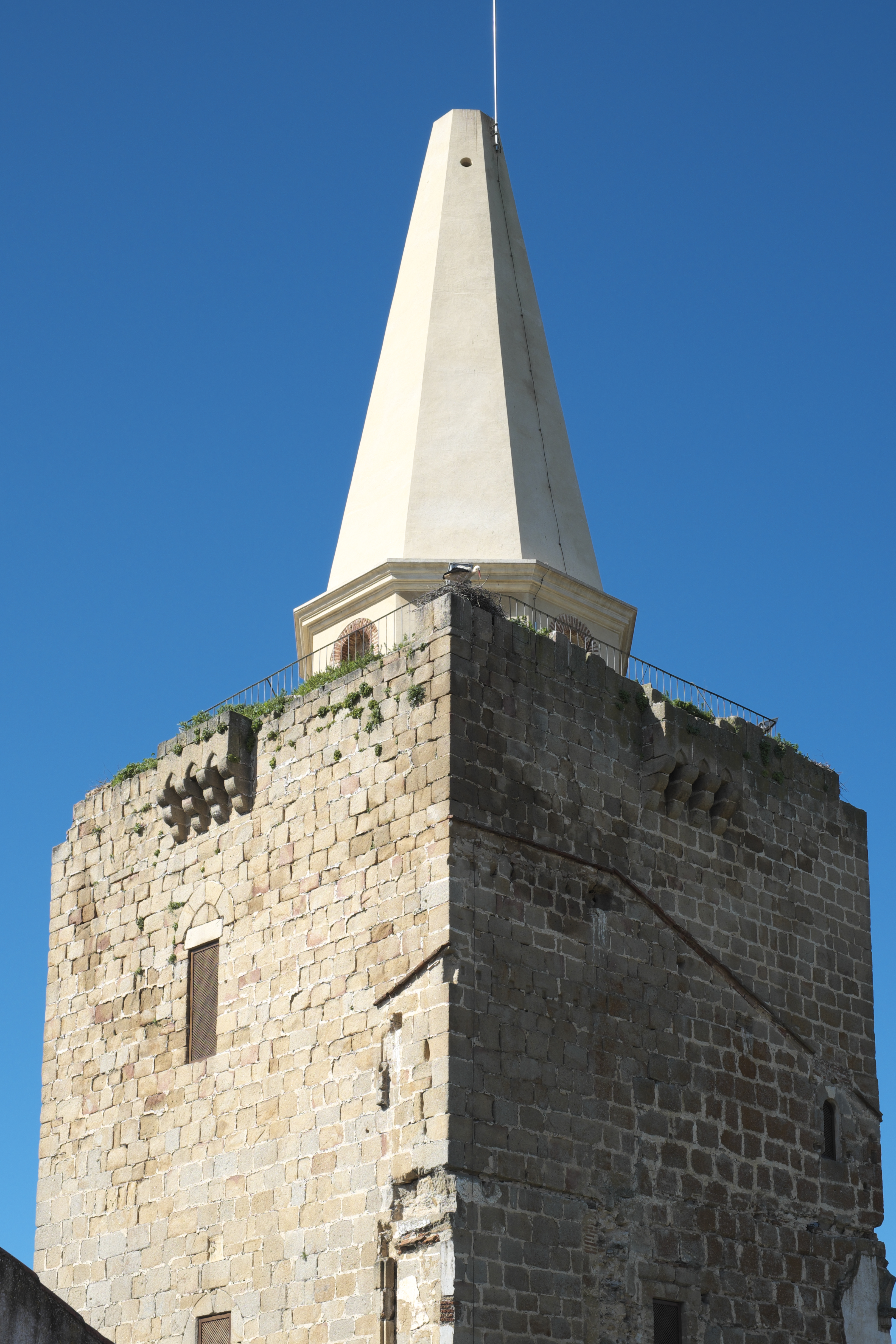 Wehrturm, La Picota, in Galisteo in der Provinz Cáceres (Extremadura/Spanien)